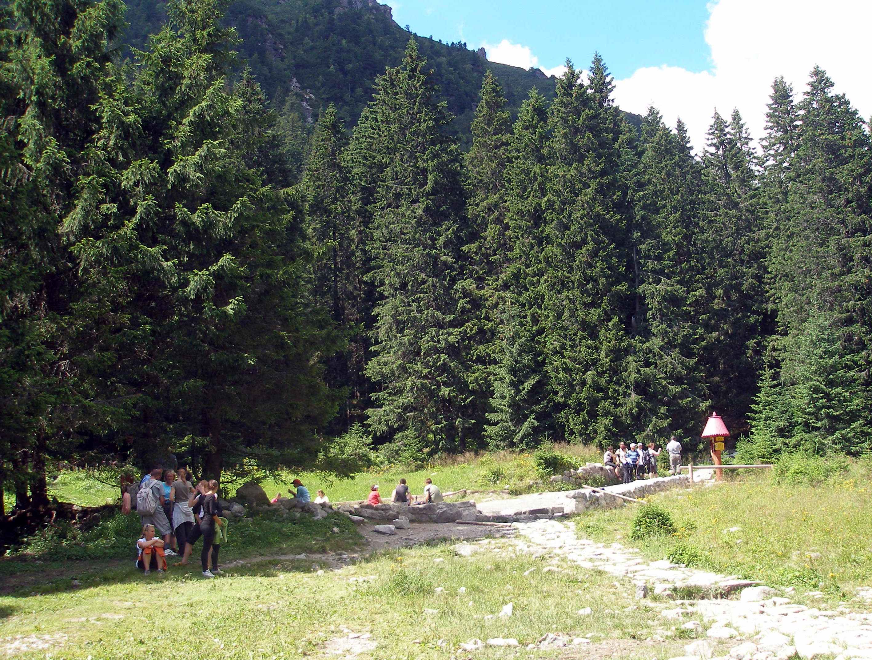 Vysokohorské stredisko Hrebienok nad Starým Smokovcom pri Rainerovej chate